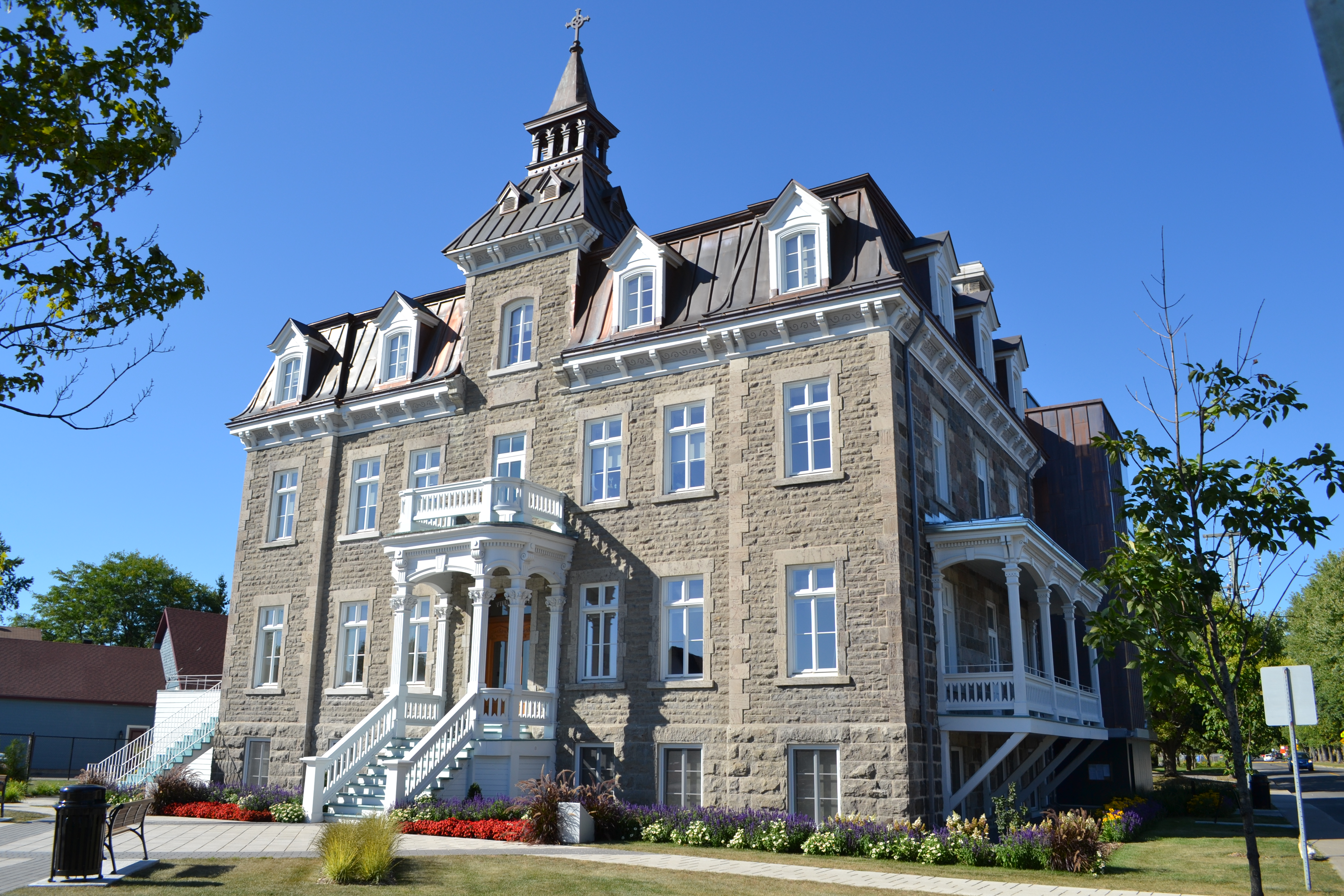 Couvent de Saint-Roch-de-l'Achigan au Québec construit en 1881.